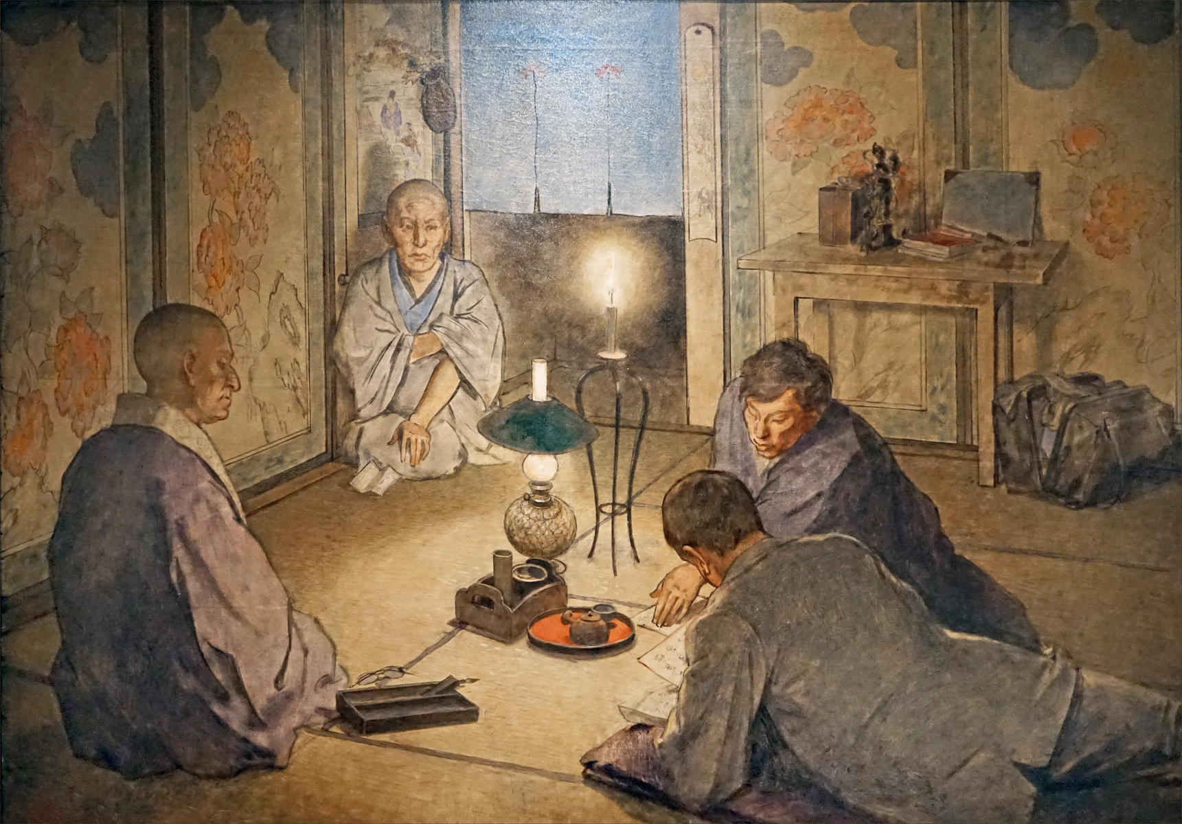 Deux prêtres de la secte Shingon à Kyoto expliquant à Émile Guimet les qualités de leur dogme Oeuvre de Félix Régamey (1844-1907) 1877-1878 Huile sur toile, France Commande d'Émile Guimet Collection du MNAAG L’exposition traite du voyage effectué en 1876-1877 autour du monde d’Émile Guimet accompagné du peintre et illustrateur Félix Régamey. Au cours de ce voyage, Émile Guimet a étudié les religions des pays visités, rédigé un journal de voyage et acheté de nombreux livres et objets. De son coté, Felix Régamey a fait de nombreux croquis et dessins des lieux visités et des personnes rencontrées. Les objets, statues, documents, dessins et tableaux issus du voyage seront présentés lors de l'Exposition Unverselle de 1878 à Paris, dans une aile du palais du Trocadéro nouvellement construit. Émile Guimet fonde à son retour en France un musée consacré aux religions, d'abord à Lyon en 1879 puis à Paris en 1888 qu'il lèguera à l'État. L'exposition décrit le tour du monde, les visites et les rencontres des 2 voyageurs, illustrés par les tableaux et dessins de Félix Régamey. Elle explique la génèse des 2 musées et les choix muséographiques de l'époque pour le musée parisien en présentant certaines oeuvres majeures et des ensembles comme la vitrine des statues d'Avalokisteshvara et le mandala de Toji au Japon. Exposition "Enquêtes vagabondes, le voyage illustré d'Émile Guimet en Asie" au musée national des arts asiatiques-Guimet (MNAAG), Paris